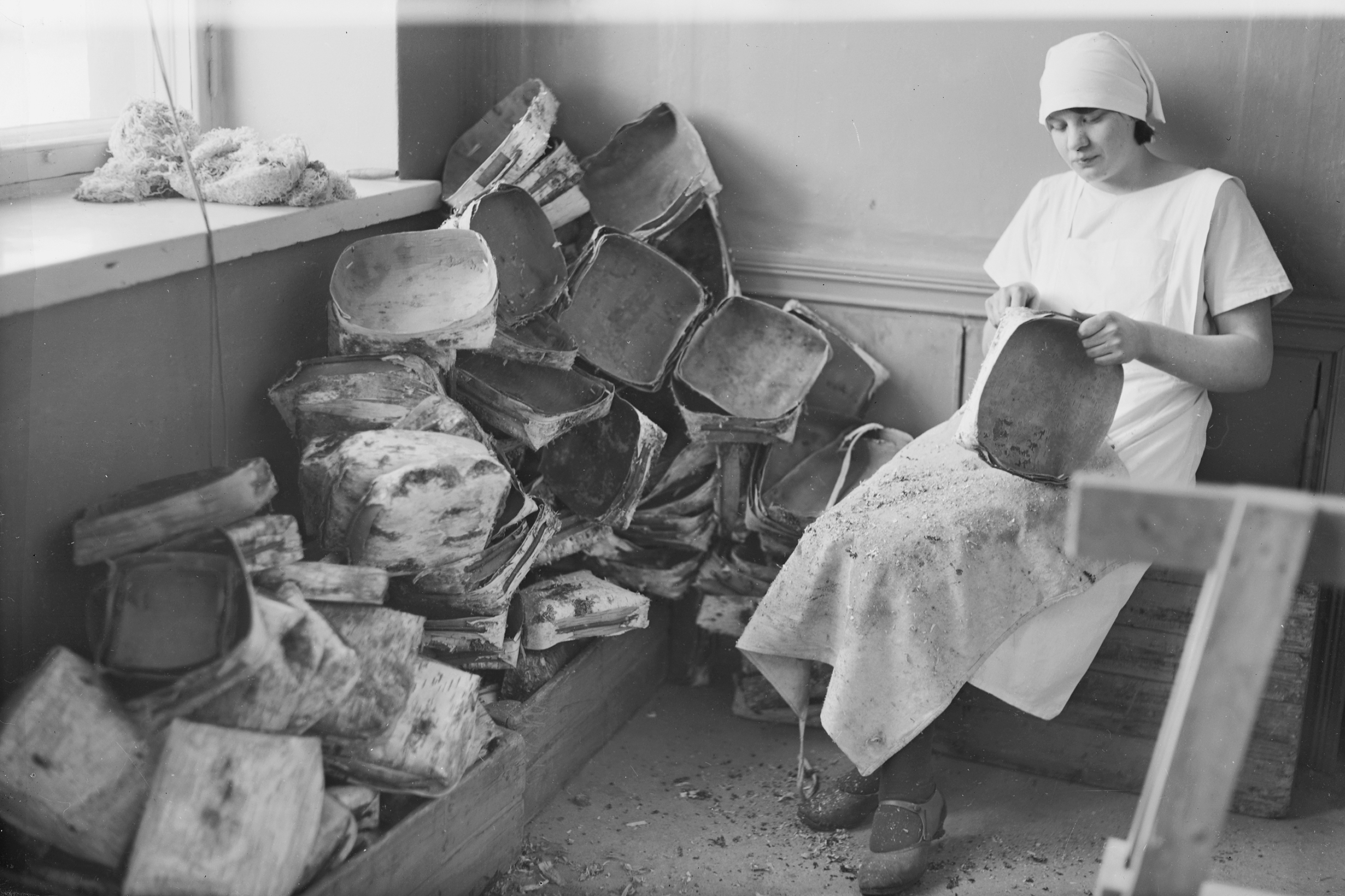 Nainen tekee mämmituokkosia 1930-luvun alussa Helsingissä